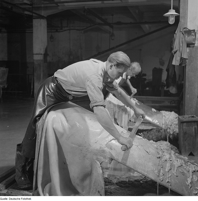 Original image description from the Deutsche Fotothek Gerberei